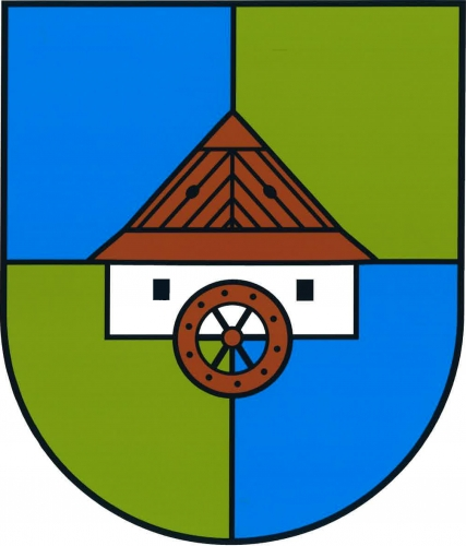 Vysočina (okres Chrudim), znak obce. V modro-zeleně čtvrceném štítě stříbrný mlýn se dvěma černými okny, s dřevěnou střechou a kolem přirozené barvy.